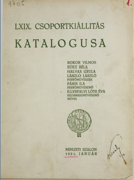 Nemzeti Szalon kiállításának katalógusa